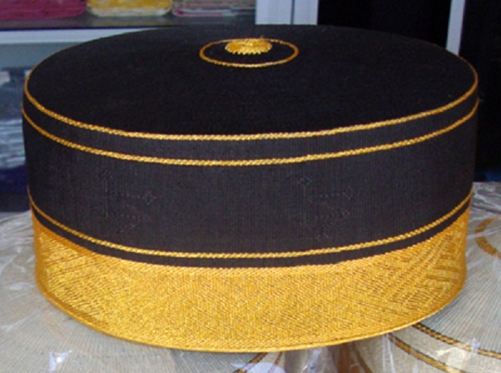 Songkok Guru Khas Suku Makassar